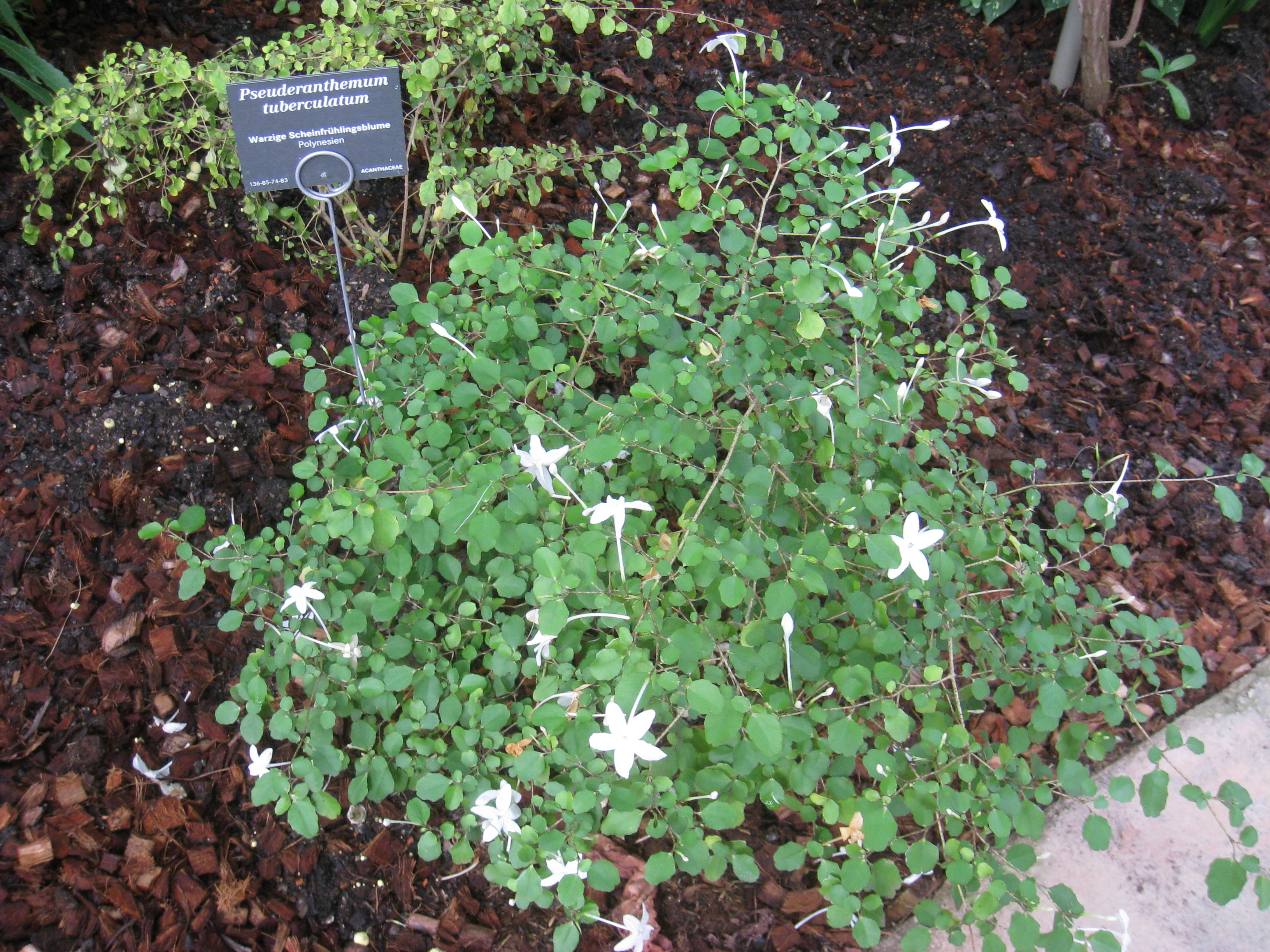 Pseuderanthemum tuberculatum specimen in the Botanischer Garten, Berlin-Dahlem (Berlin Botanical Garden), Berlin, Germany.